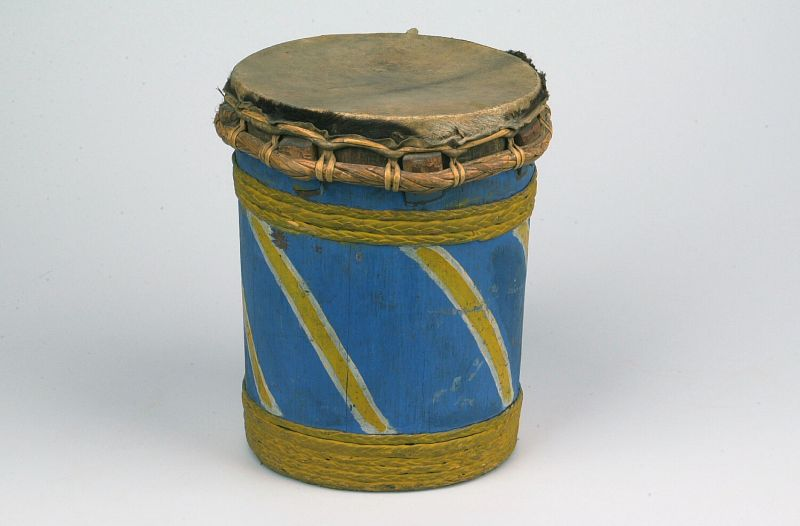 Slaginstrument. Enkelvellige cilindrische trom Unknown language: Dogdog